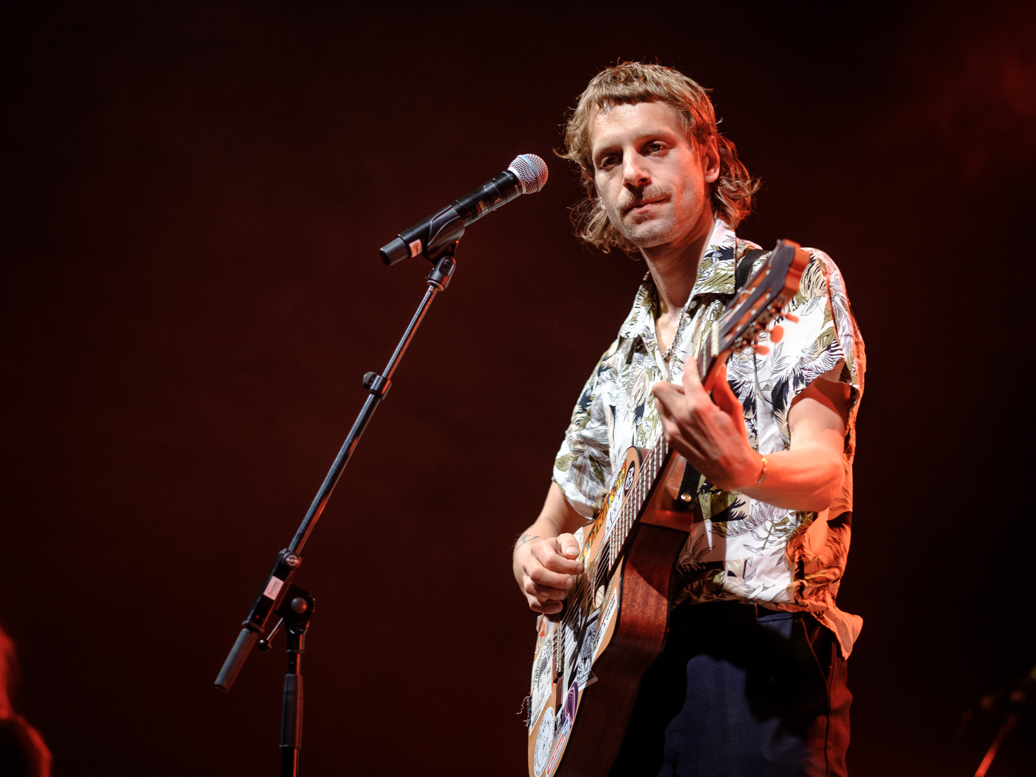 Voodoo Jürgens, österreichischer Liedermacher, bei seinem Auftritt am 2017-09-02 in Lenzing